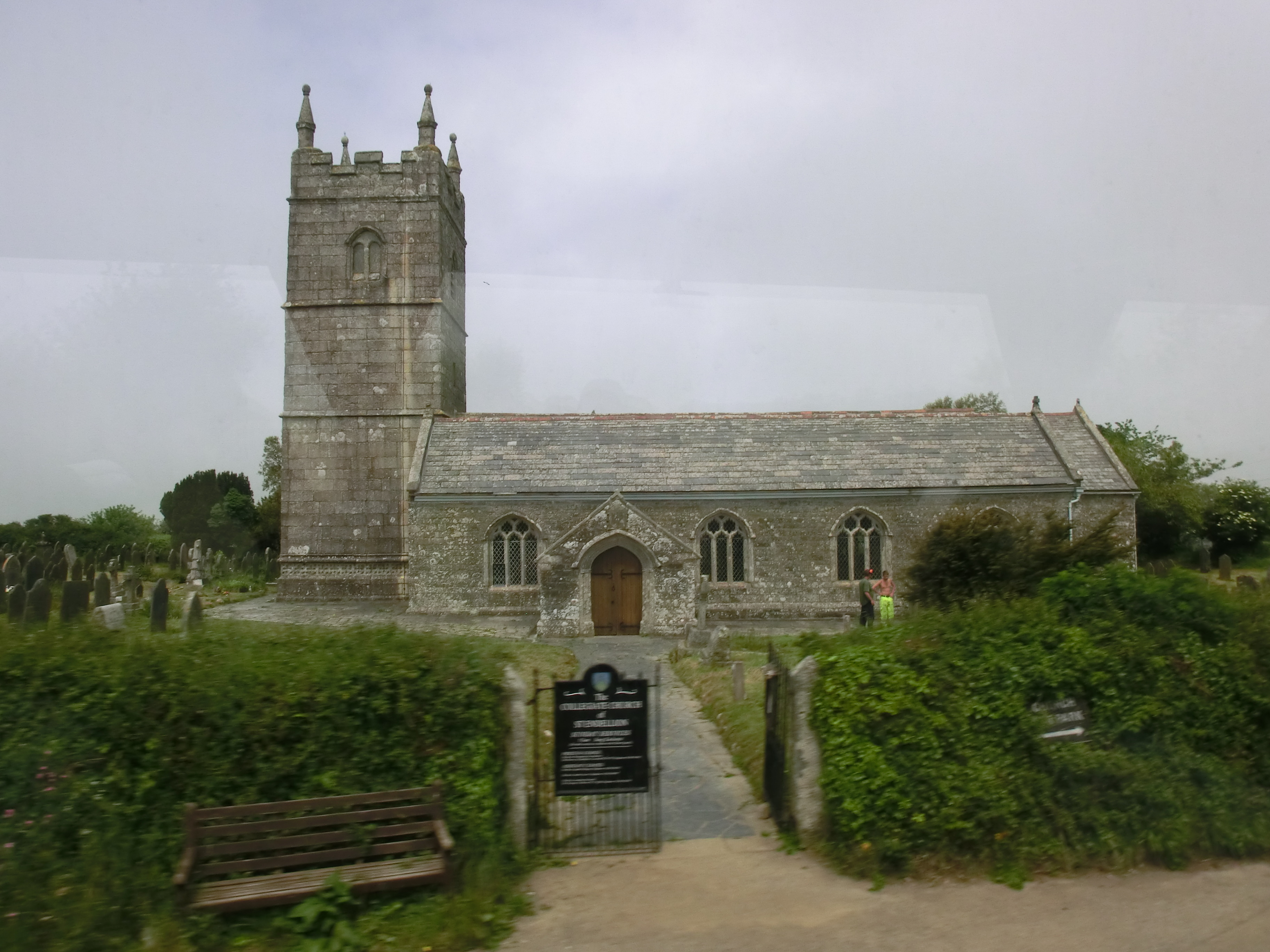 St Endellion Church Port Isaac